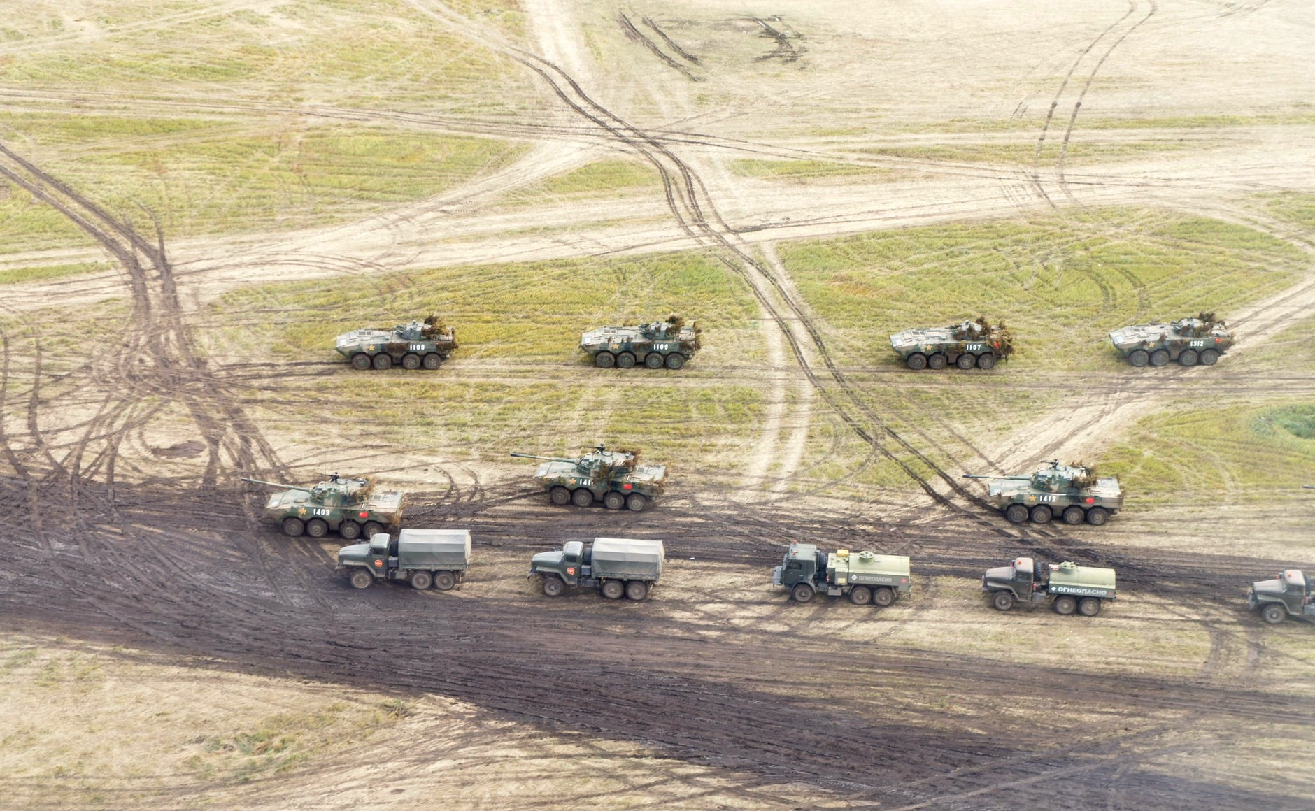 Основной этап манёвров «Восток-2018» на полигоне Цугол в Забайкальском крае.